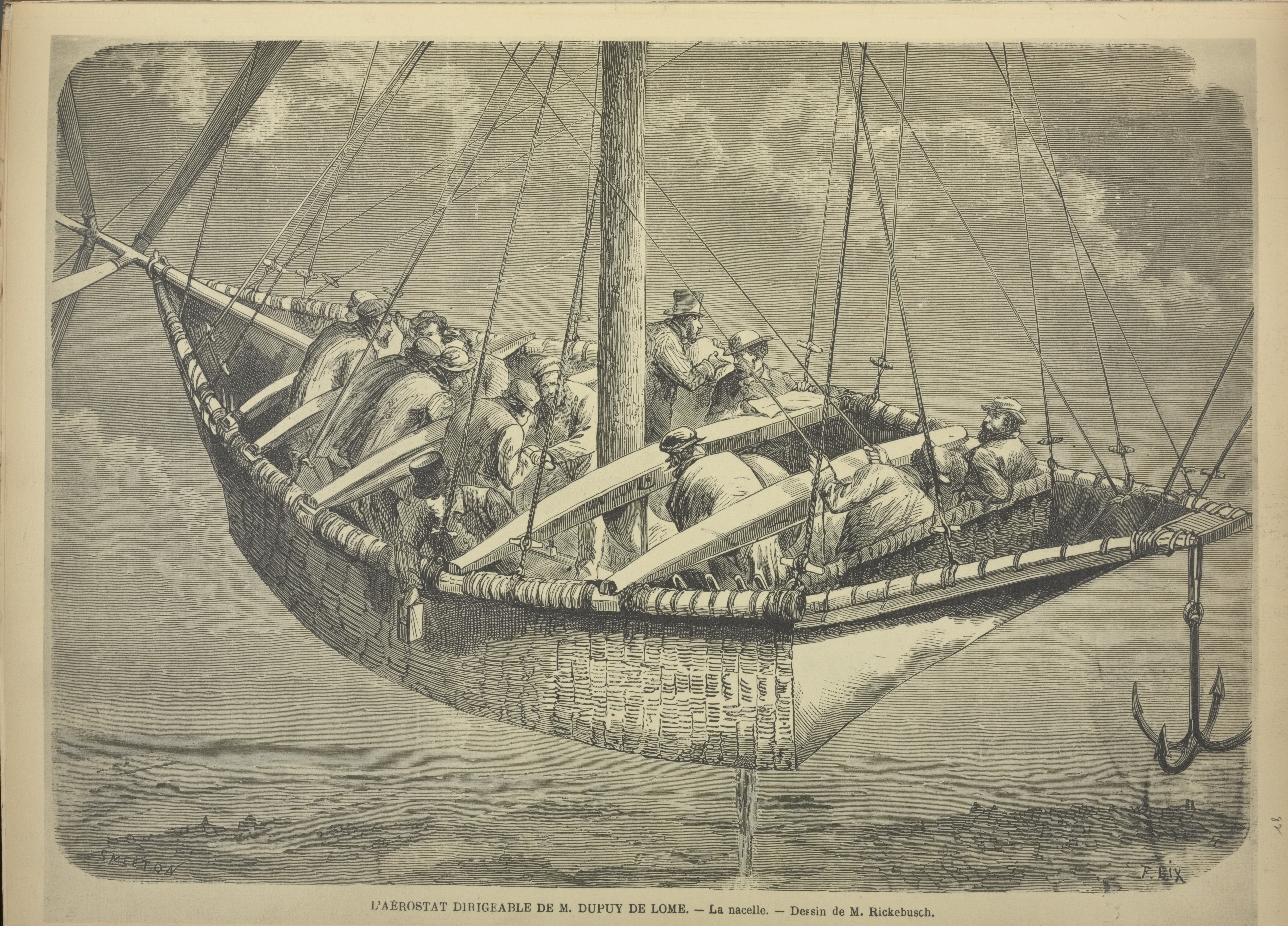 La nacelle du ballon dirigeable créé par Dupuy de Lome pour l'expérience du 2 février 1872.